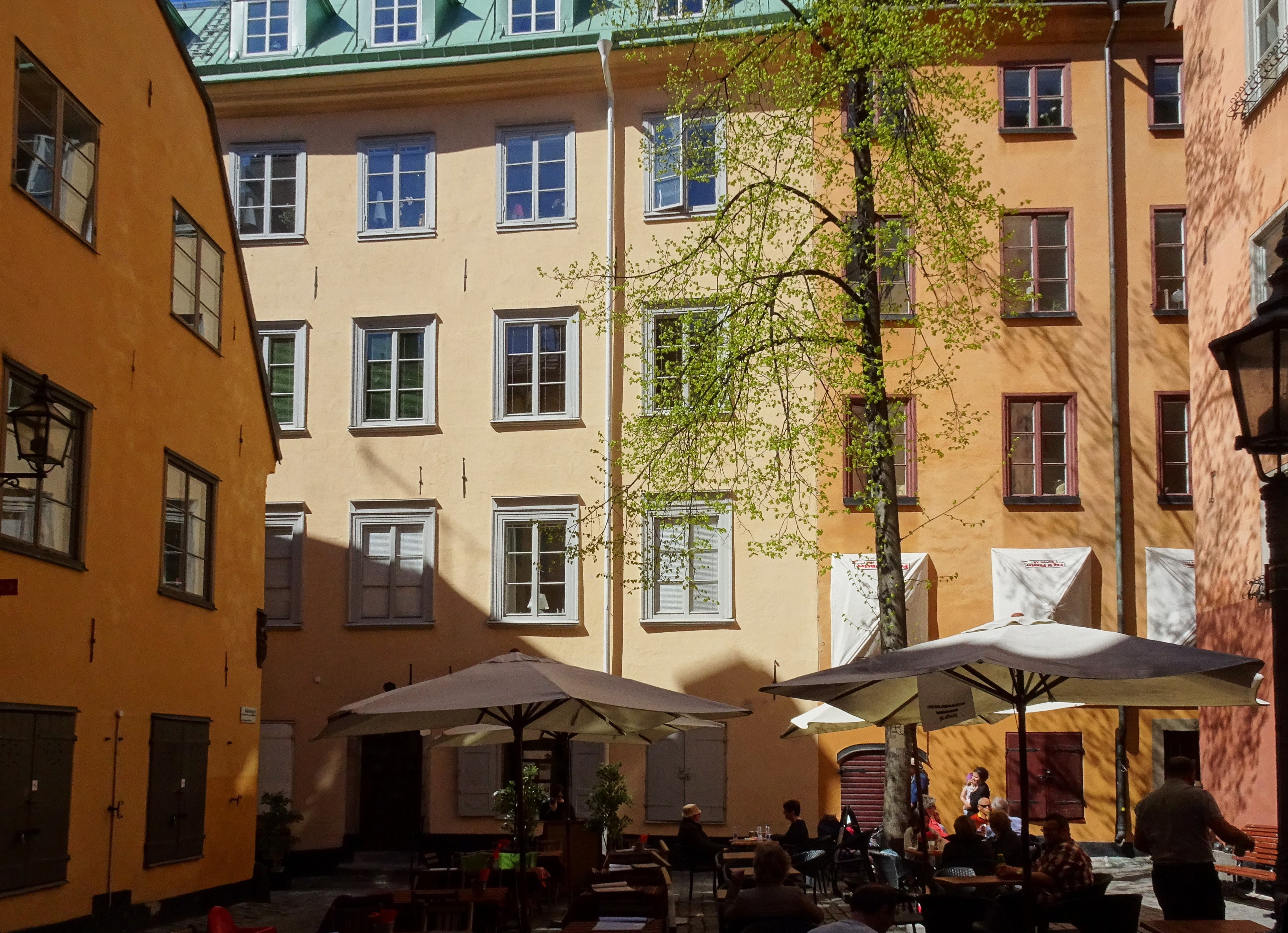 Gåstorget, vy mot Gåsgränd och kvarteret Ganymedes